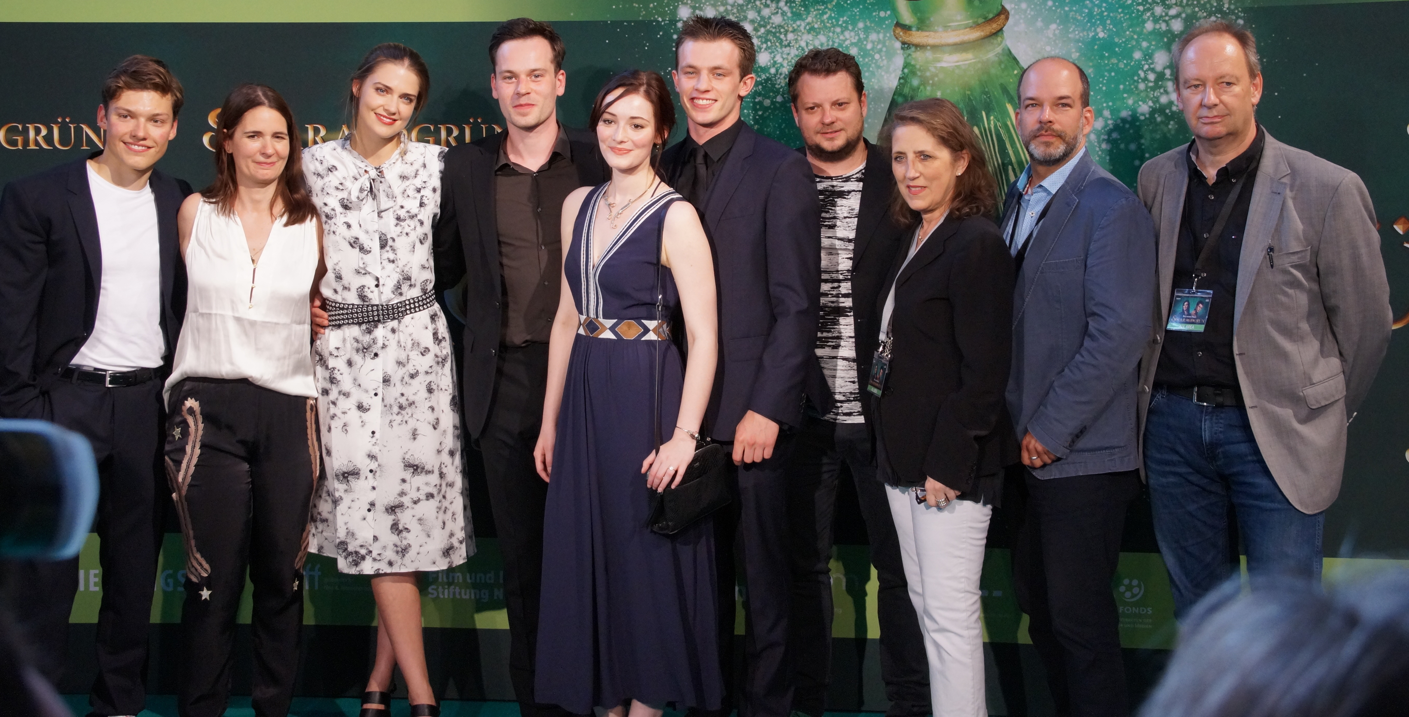 Lion Wasczyk, Katharina Schöde, Laura Berlin, Florian Bartholomäi, Maria Ehrich, Jannis Niewöhner, Felix Fuchssteiner, Petra Müller, Philipp Budweg und Andreas Habermaier bei der Deutschlandpremiere von 'Samaragdgrün', Köln, Juni 2016.